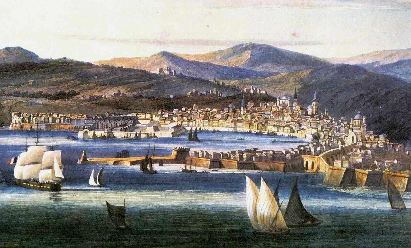 Veduta di Genova - 1810 circa (particolare sulle mura portuali)